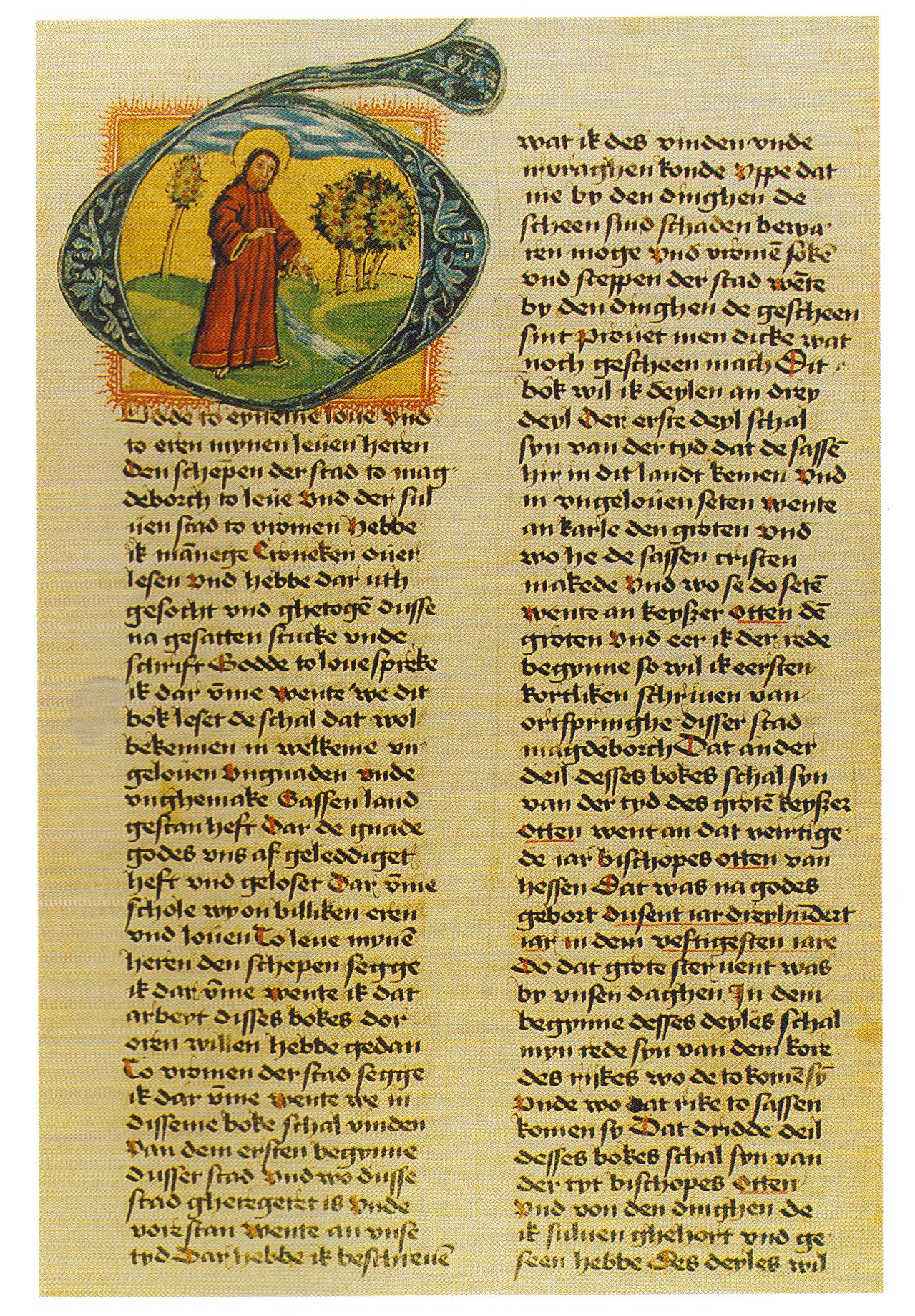 Magedeburger Schöppenchronik, Berlin, Staatsbibliothek, Ms. Boruss. fol. 172, Bl. 36r